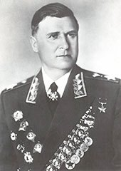 Василий Данилович Соколовский (1897 — 1968) — советский военачальник, Маршал Советского Союза